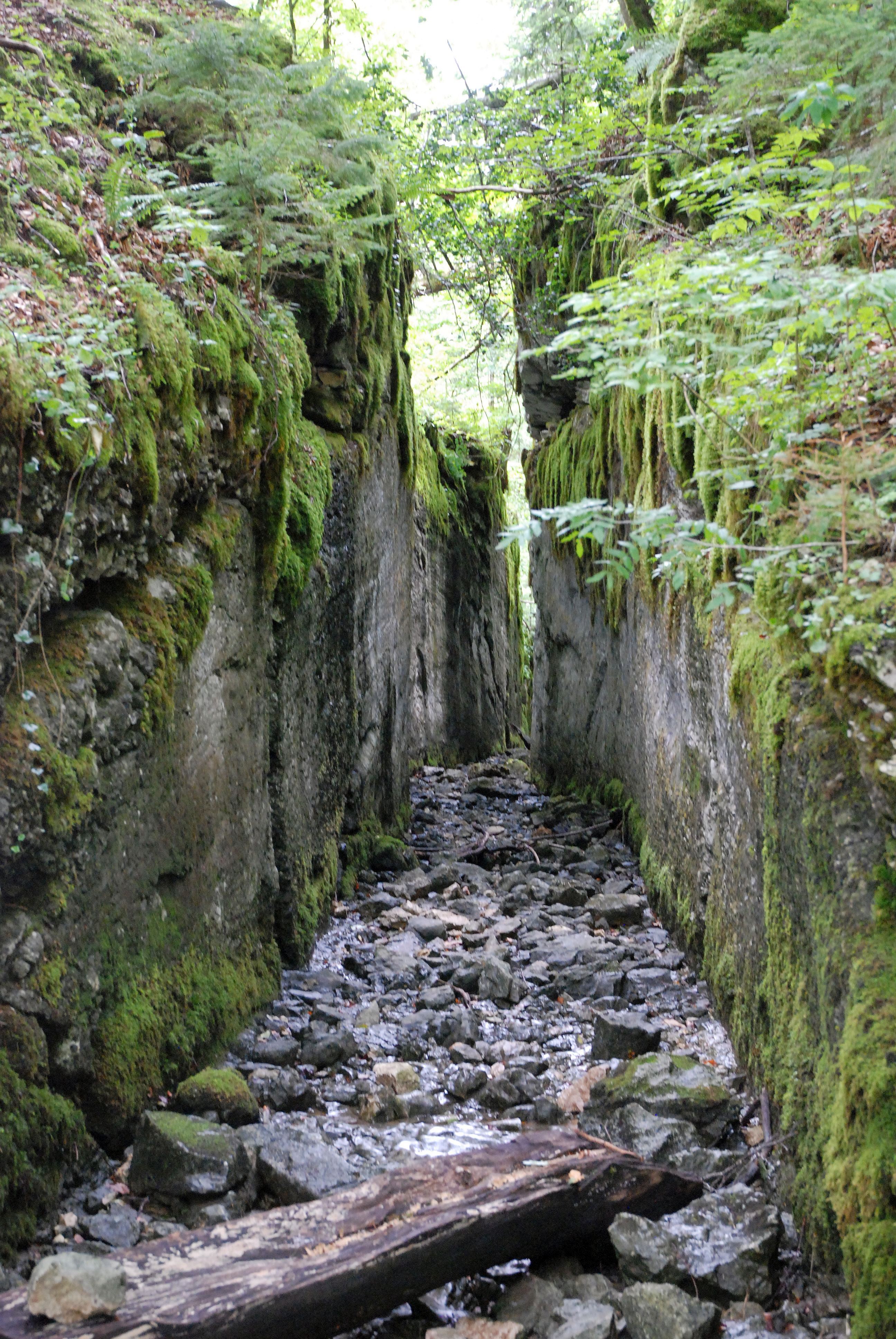 Triftkanal zwischen Kammersee und Toplitzsee, Salzkammergut, Österreich